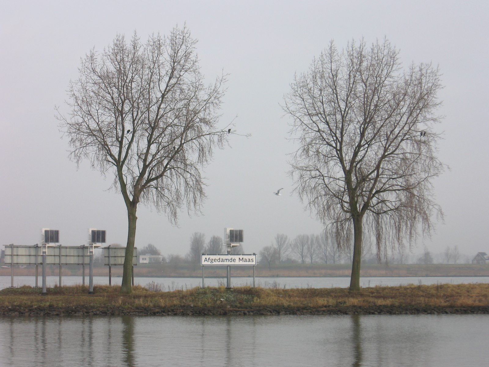 Zicht op een deel van de Afgedamde Maas bij Woudrichem